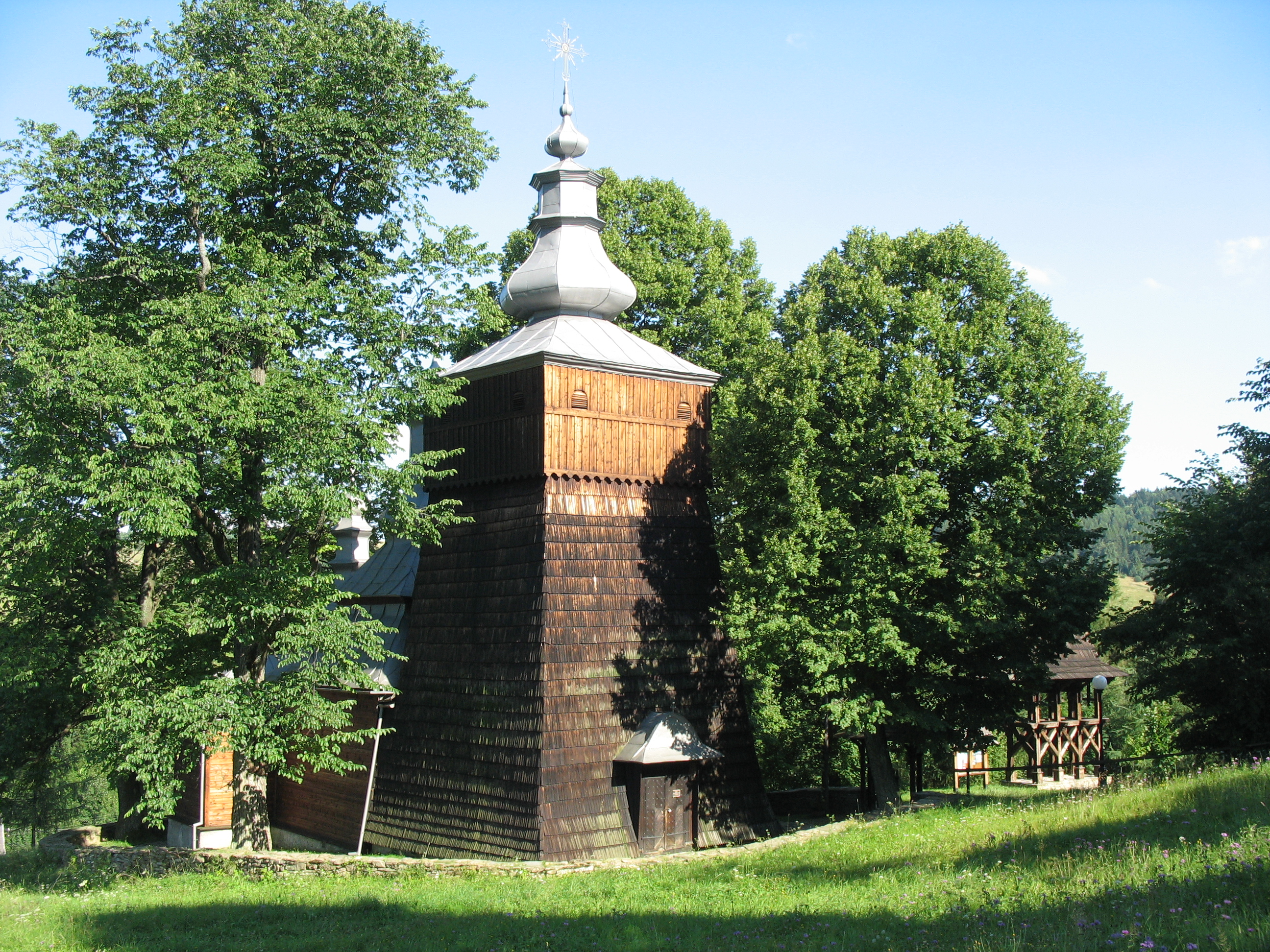 Cerkiew w Wojkowej